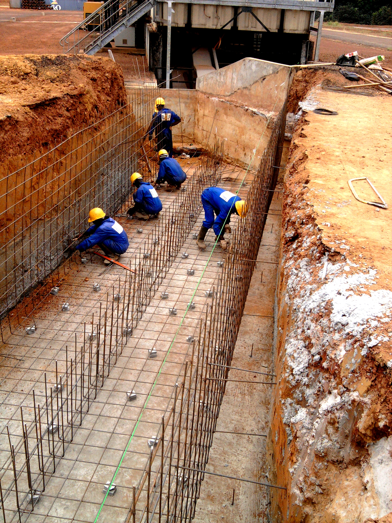 Caniveaux pour conduite de gaz a Onal. Réalisation : E.G.F.